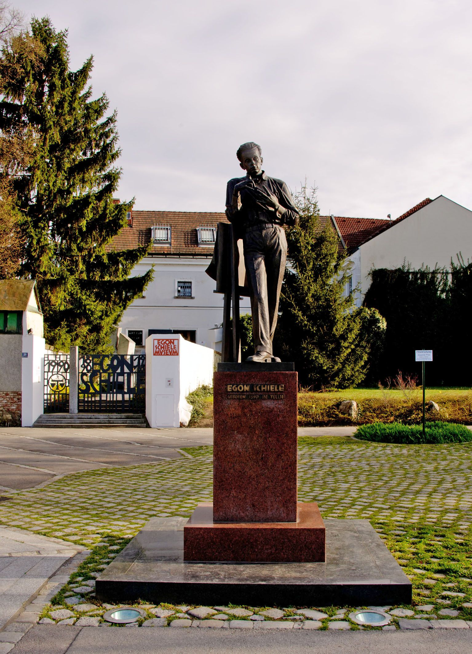 Egon Schiele Museum in Tulln, Landesmuseum Niederösterreich